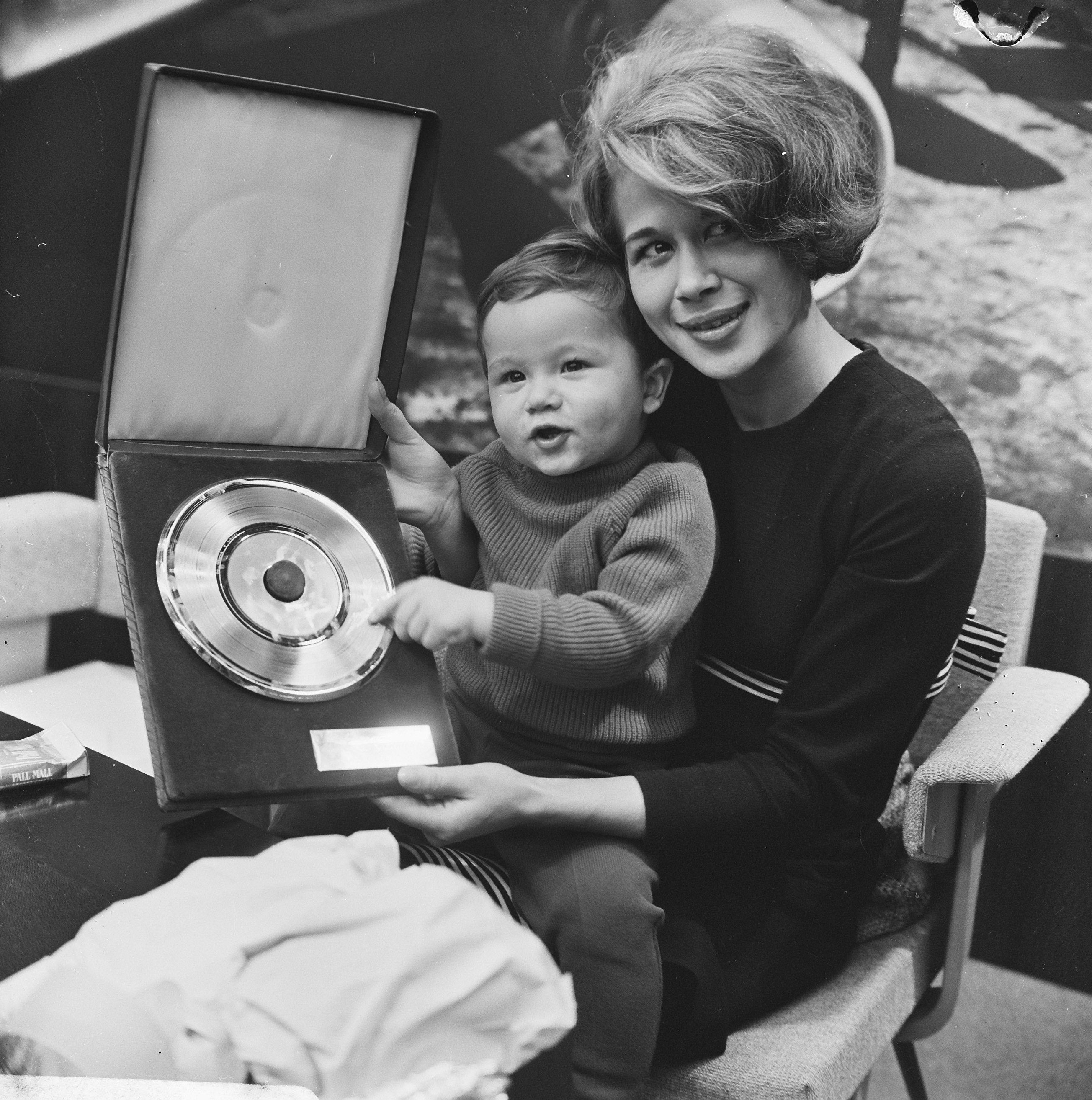 Collectie / Archief : Fotocollectie Anefo Reportage / Serie : Anneke Grönloh met zoontje Stephan tonen in de perskamer van Schiphol de ontvangen zilveren plaat Beschrijving : zangeressen, muziekprijzen, Anneke Grönloh Datum : 22 september 1966 Locatie : Noord-Holland, Schiphol Trefwoorden : muziekprijzen, zangeressen Persoonsnaam : Grönloh, Anneke, Grönloh, Stephan Fotograaf : Koch, Eric / Anefo Auteursrechthebbende : Nationaal Archief Materiaalsoort : Negatief (zwart/wit) Nummer archiefinventaris : bekijk toegang 2.24.01.03 Bestanddeelnummer : 919-5902